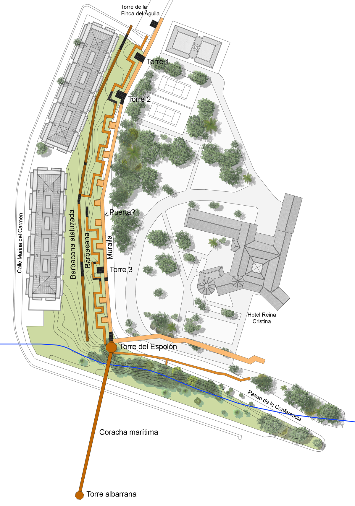 Mapa del yacimiento de la Huerta del Carmen de Algeciras, Andalucía, España.